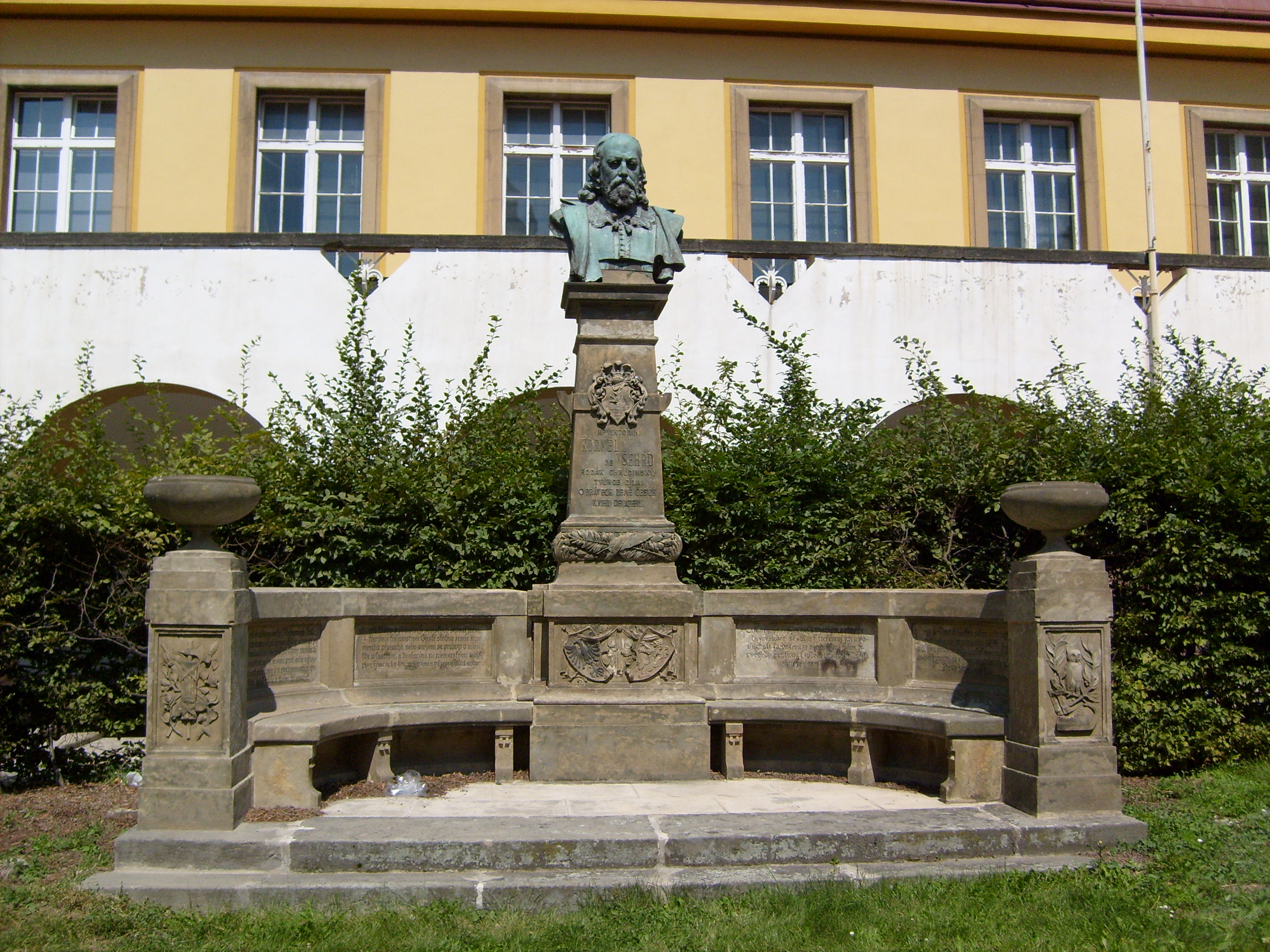 Pomník Viktorina Kornela ze Všehrd, Chrudim, Pardubice Region, Czech Republic